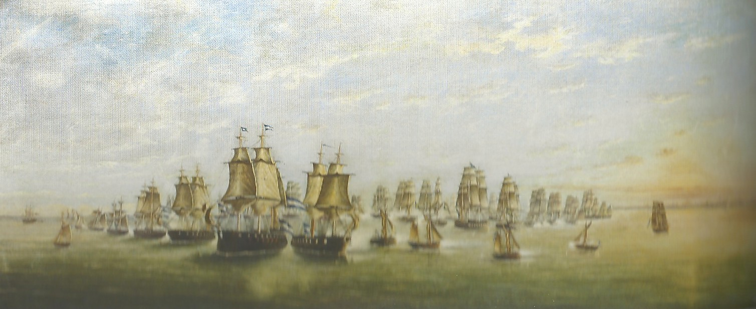 "Segunda posición del combate naval de los pozos. Guerra contra el Imperio del Brasil (1826-1828)". Conservada en el museo naval de Tigre